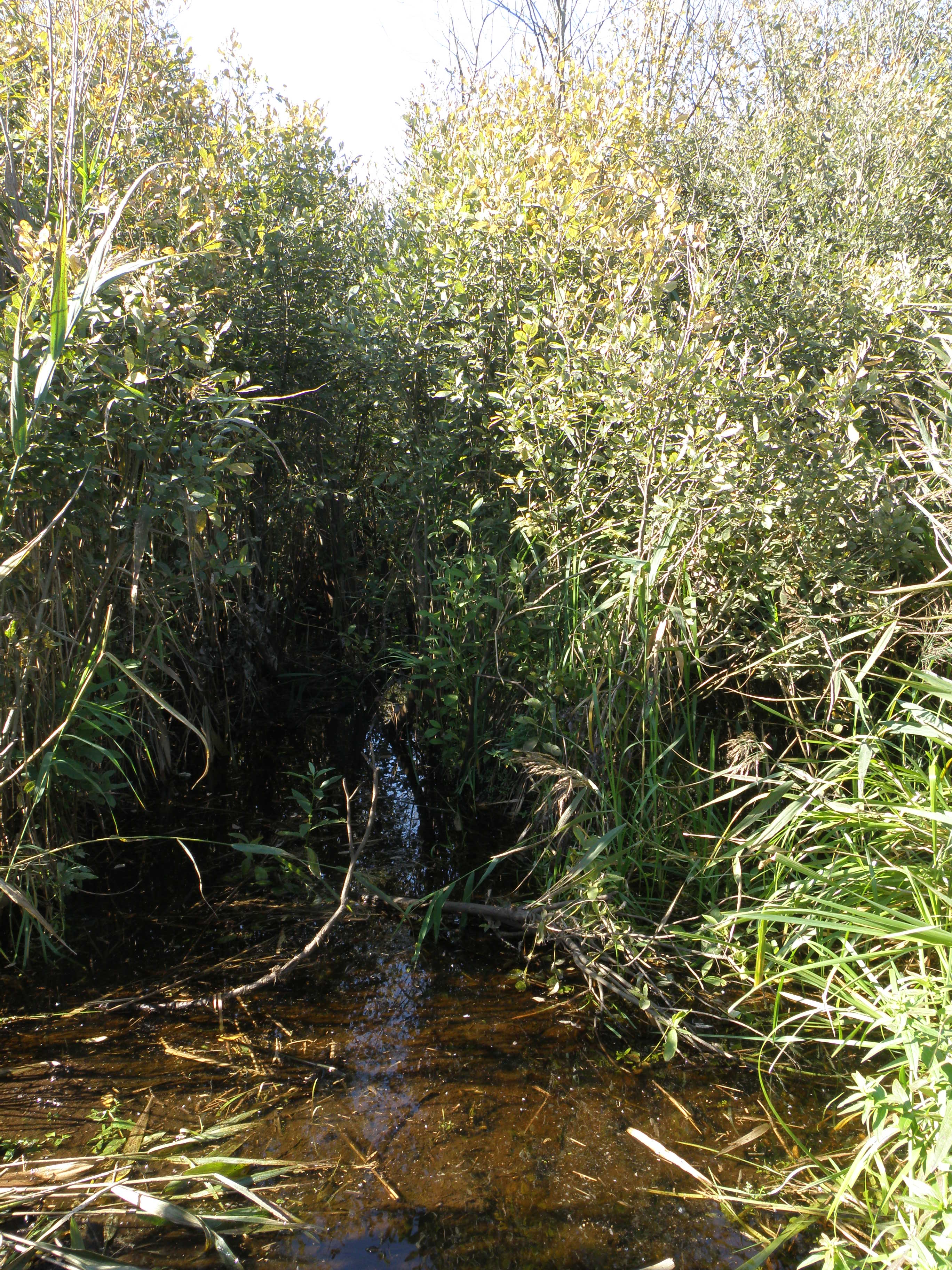 Протока в пойме Поли